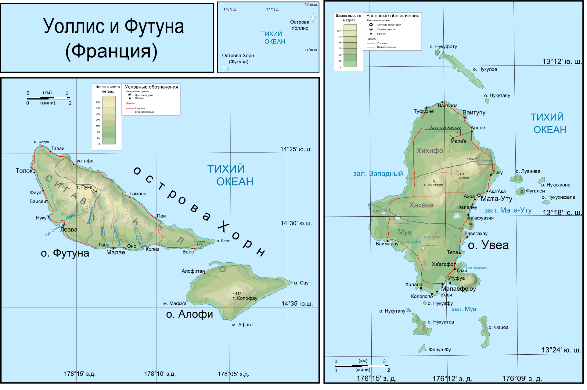 Топографическая карта островов Уоллис